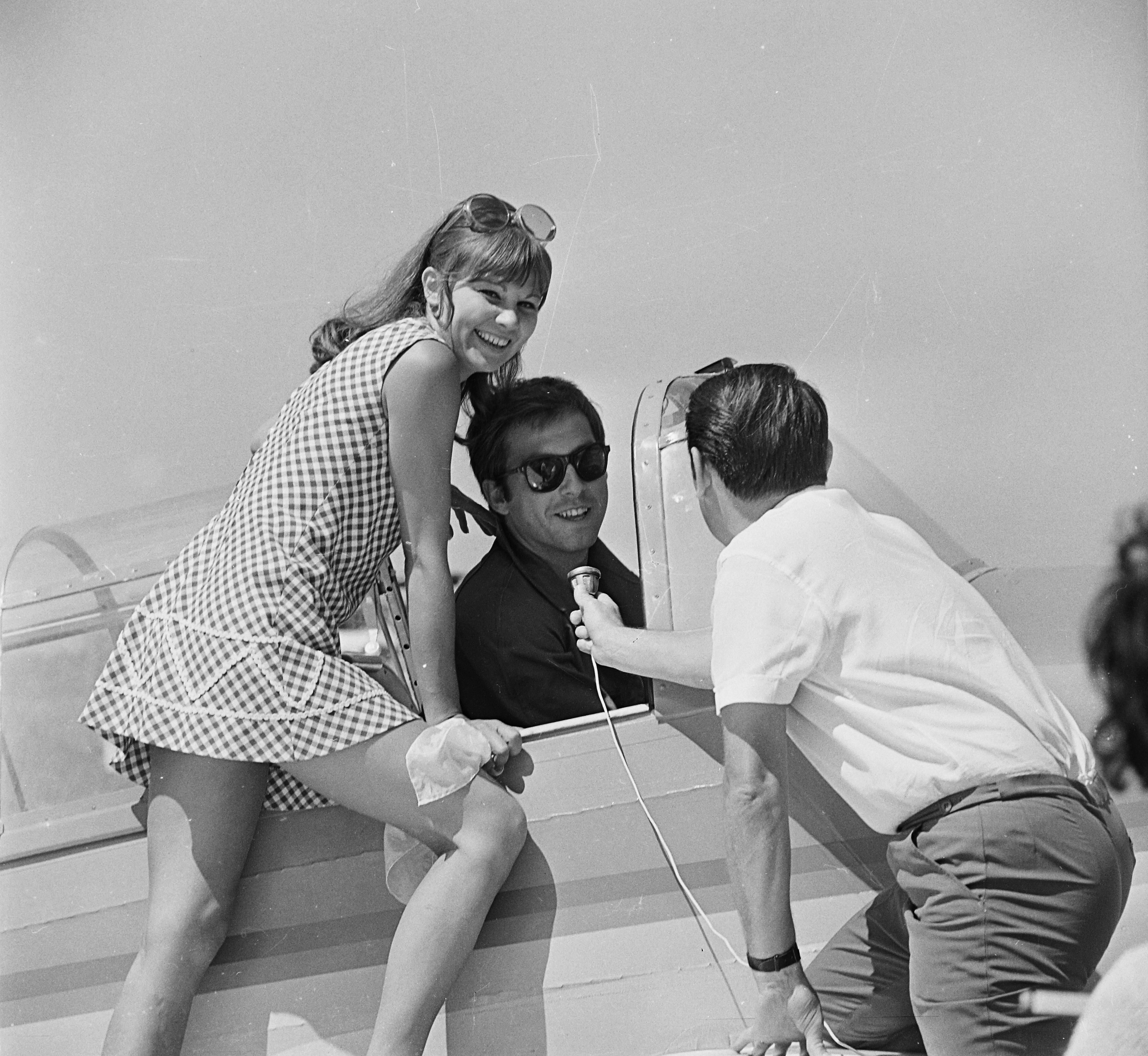 Almási Éva és Huszti Péter színművészek, Bokodi Béla riporter. Zlin Trener típusú repülőgép. A felvétel az Őrjárat az égen című tévésorozat forgatásán készült Location: Hungary Tags: art of theater, celebrity, actor, reporter, Czechoslovak brand, Zlin-brand, airplane, airport Title: Almási Éva és Huszti Péter színművészek, Zlin Trener típusú repülőgép.